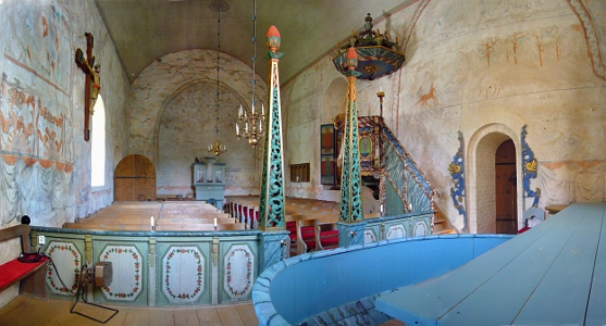 Lidens gamla kyrka, interiör mot väster.